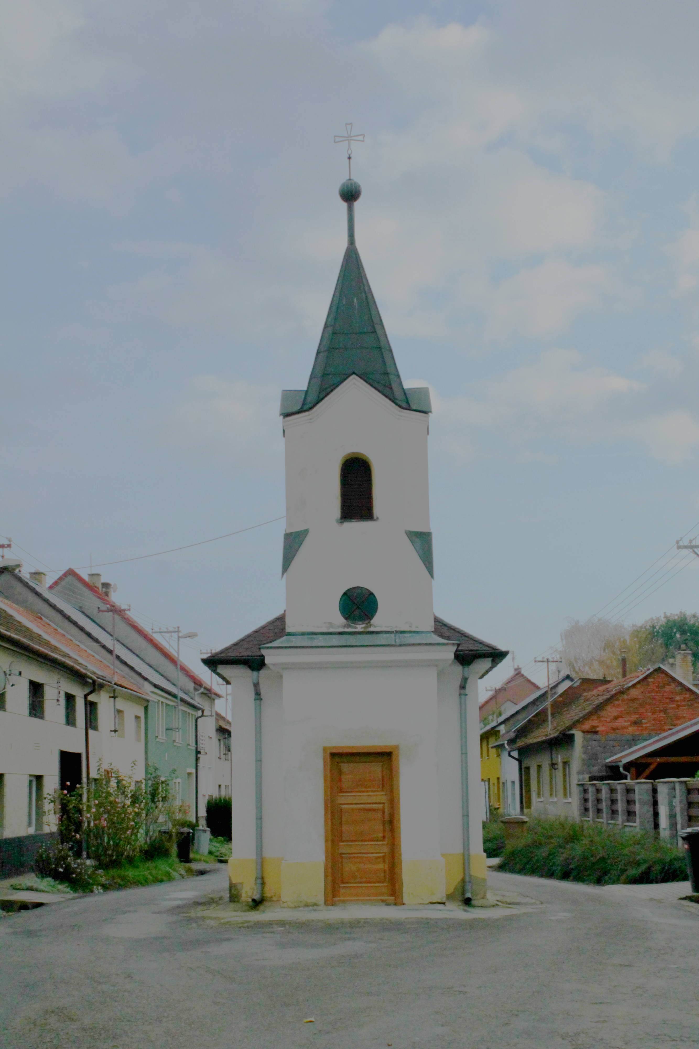 Kaple sv. Jana Nepomuckého